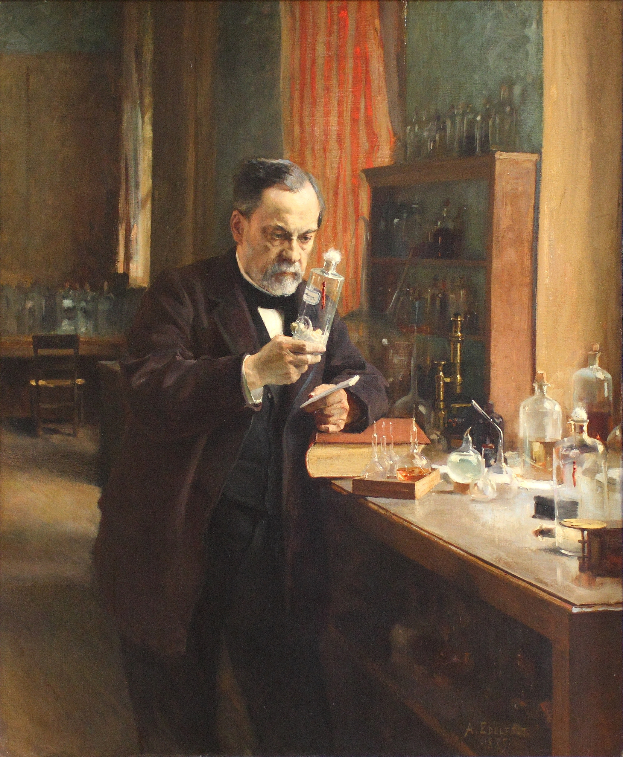 Depicted person: Louis Pasteur